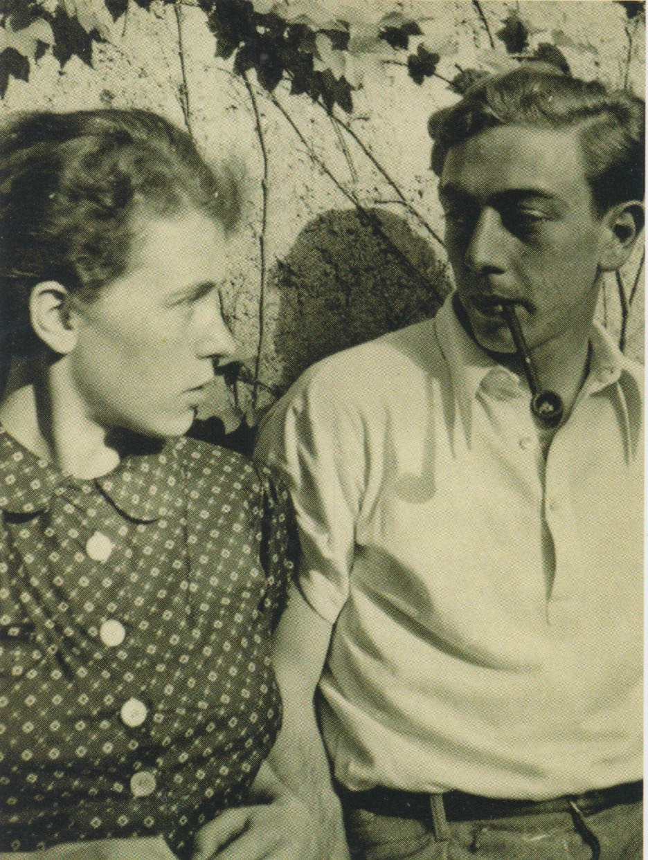 Der Maler Klaus-Andreas Moering und seine zukünftige Frau Elle Nay, Fotografie um 1937